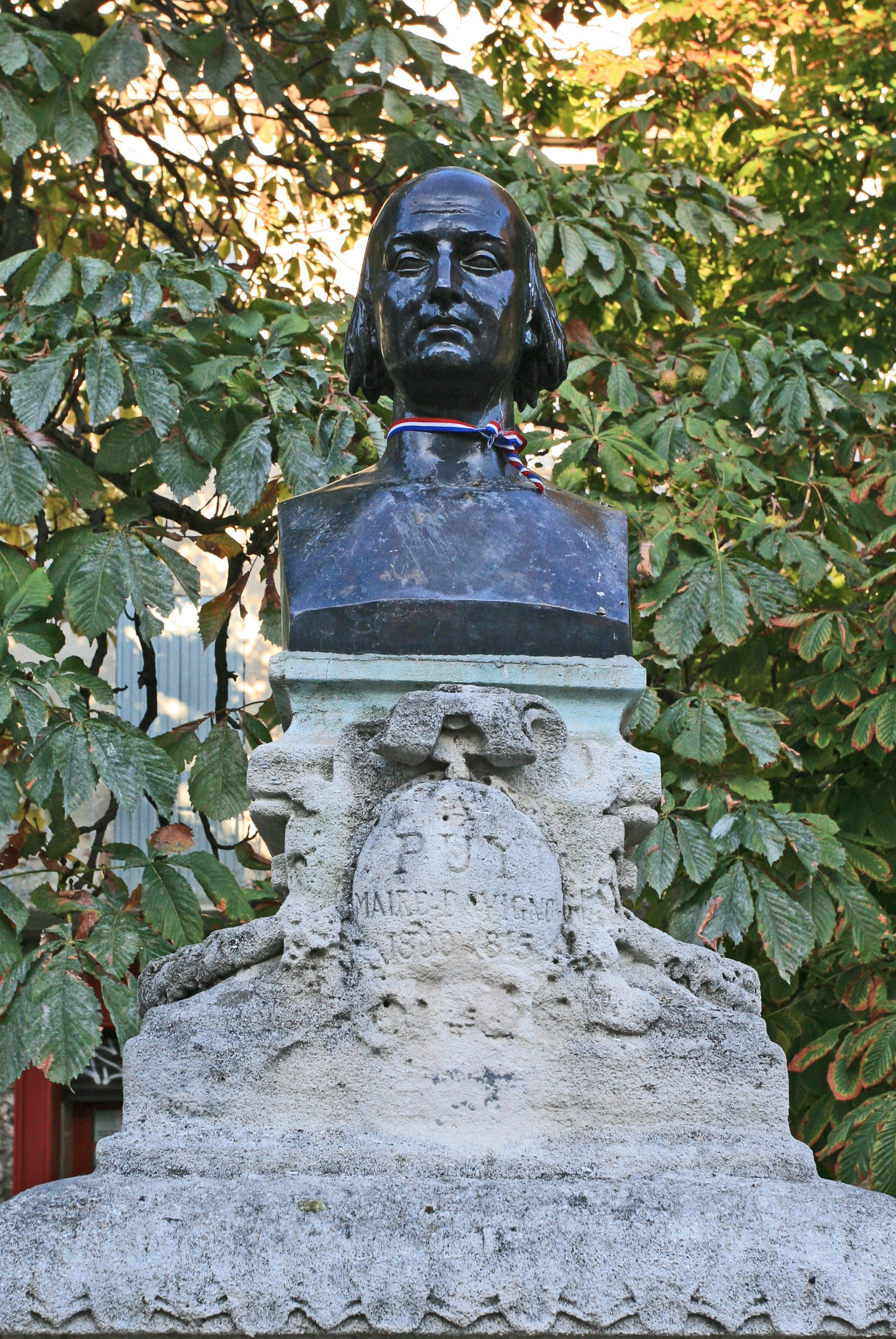 Buste de Guillaume Puy, maire d'Avignon, Vaucluse, France